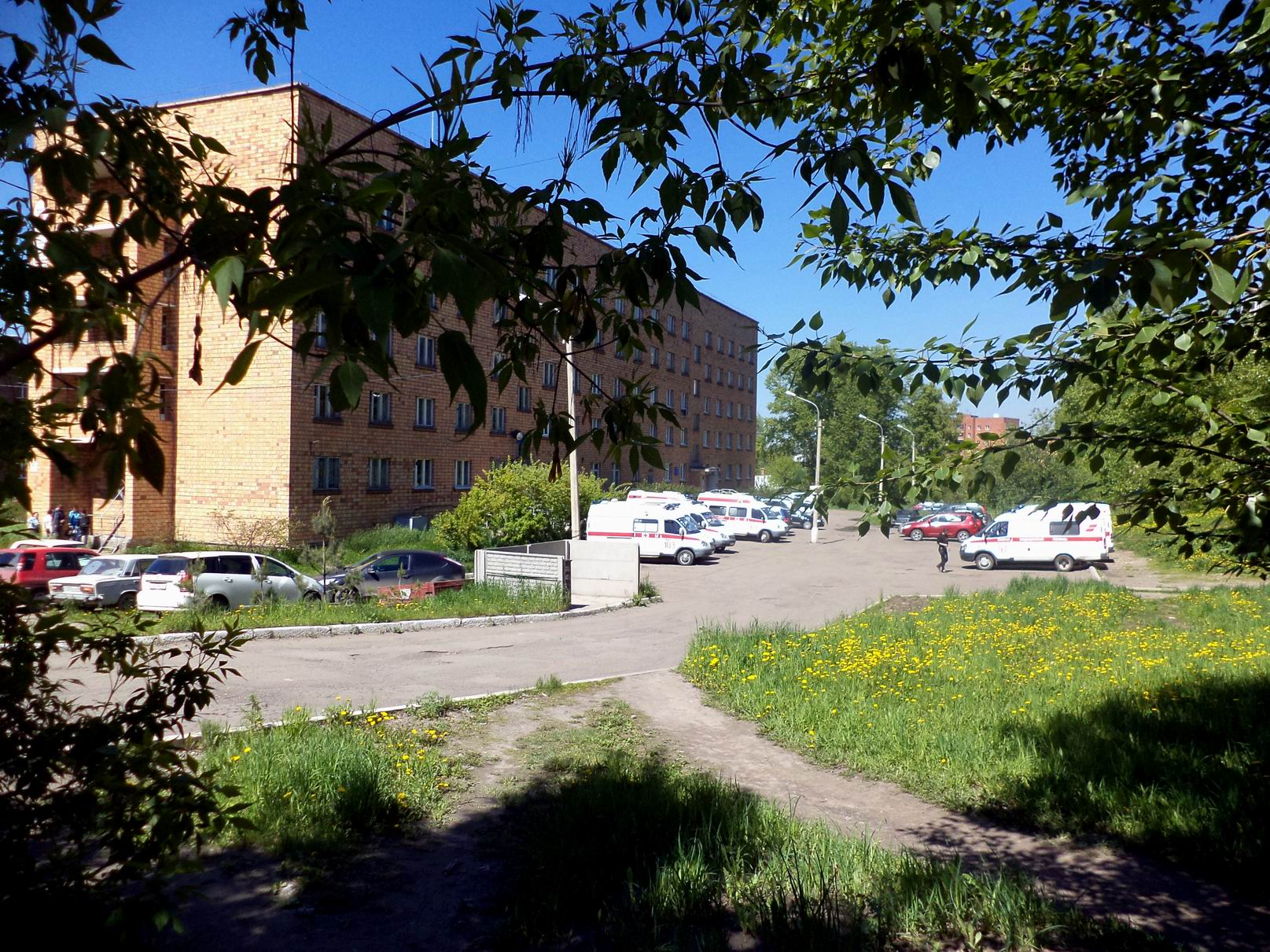 Подстанция №4 при БСМП (Красноярская межрайонная клиническая больница скорой медицинской помощи имени Н.С.Карповича)